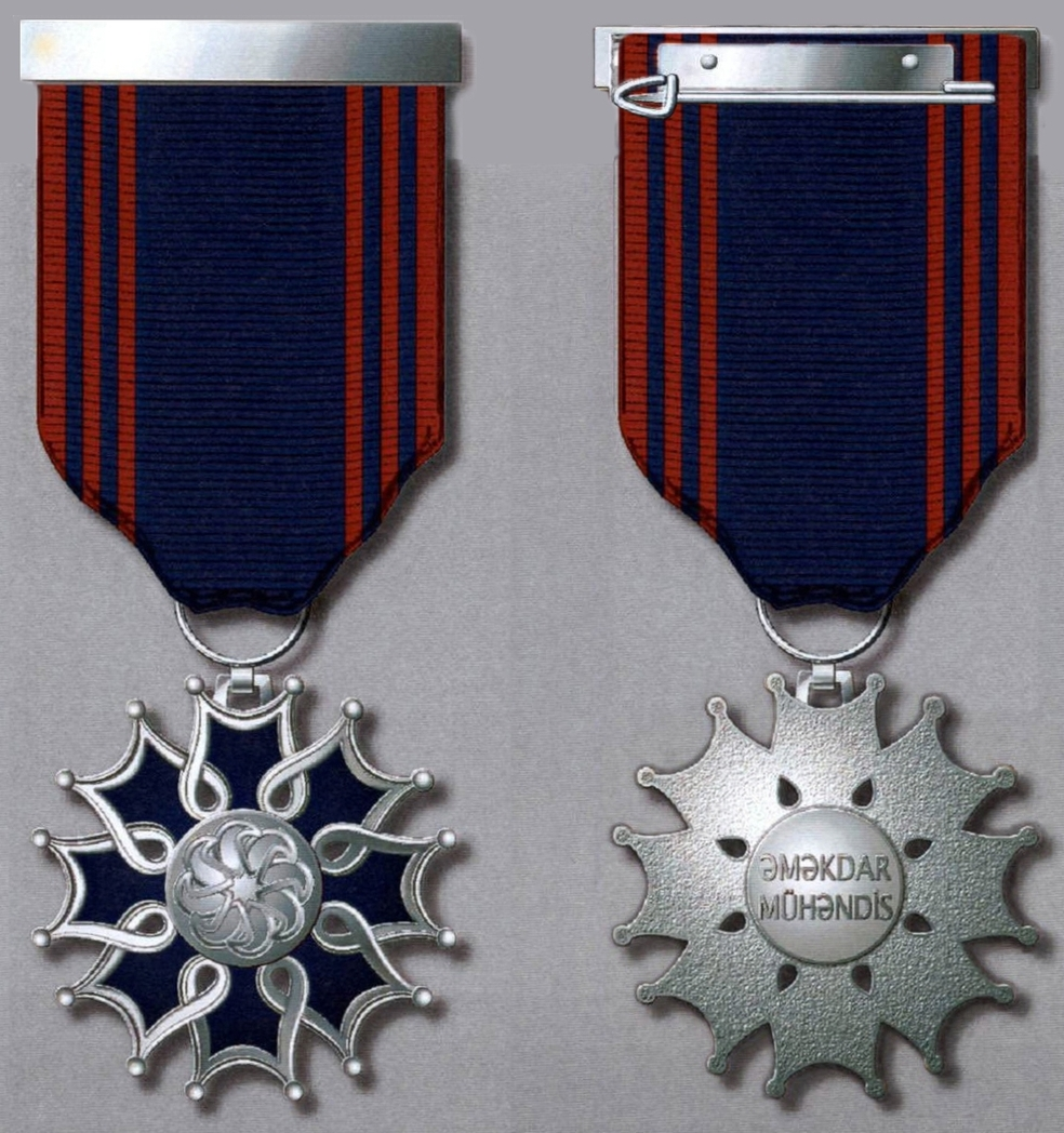 “Əməkdar mühəndis” fəxri adının döş nişanı